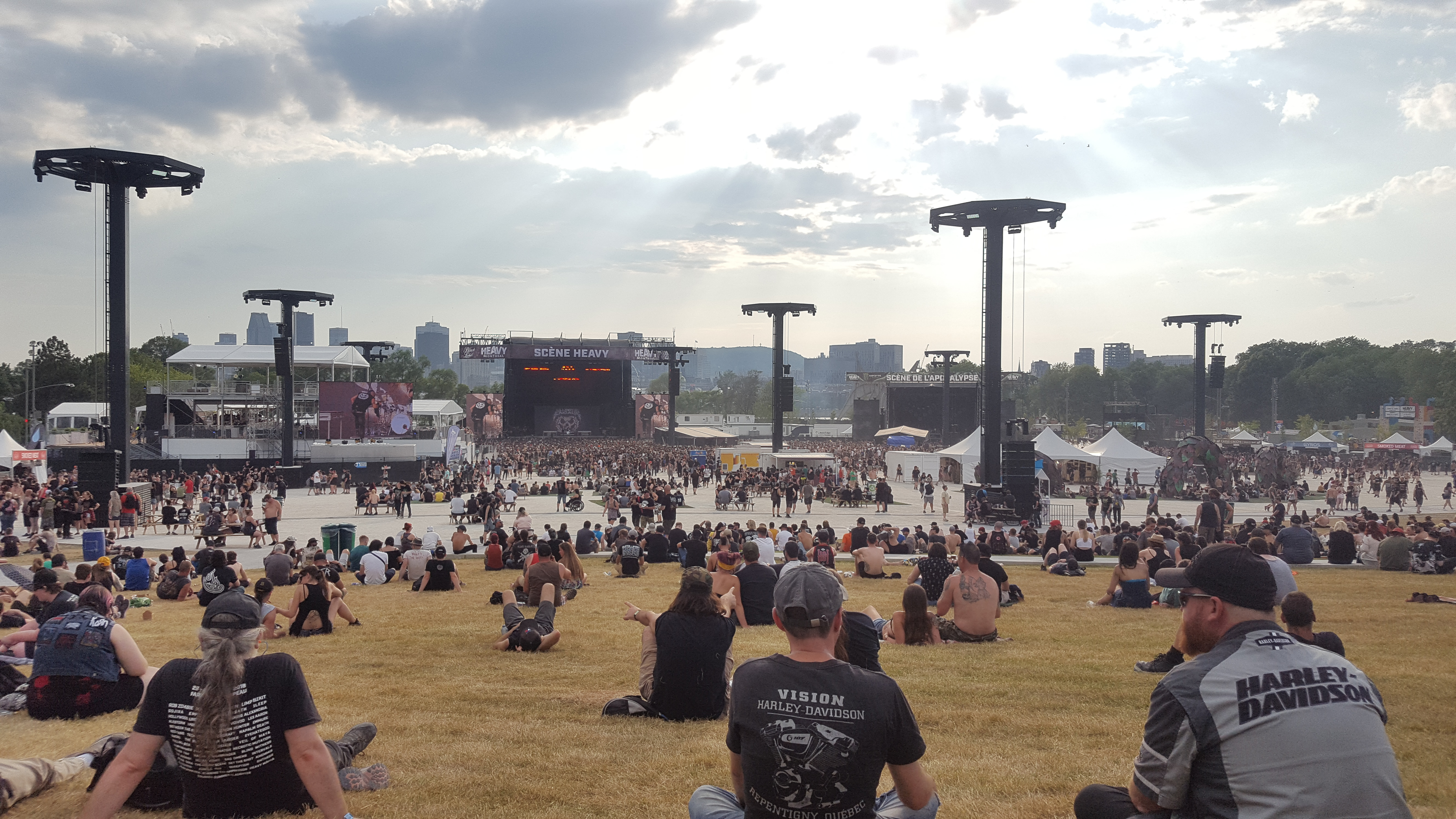 Site du Heavy Montreal au Parc Jean-Drapeau lors de l'édition de 2019